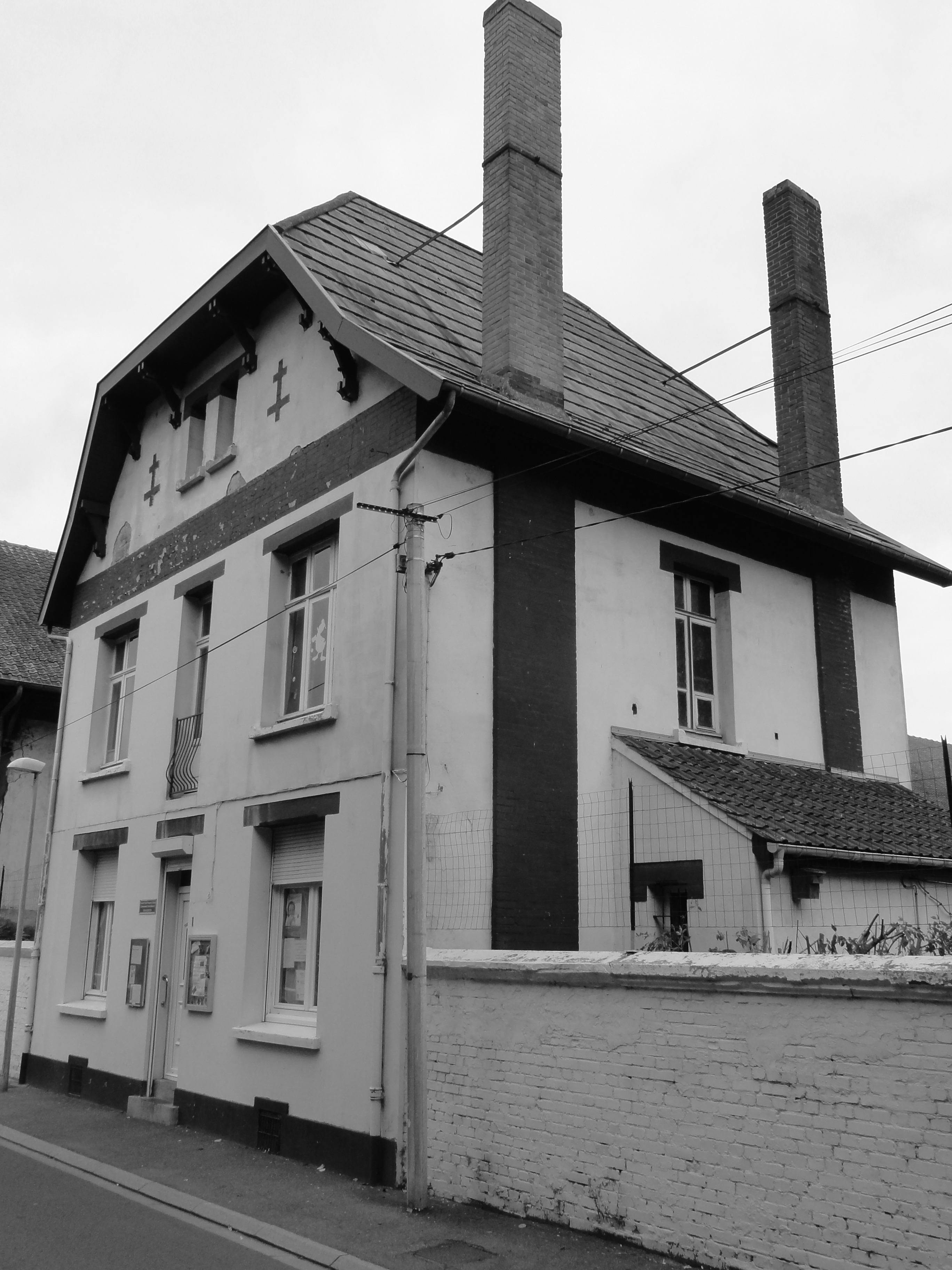 Presbytère de l'église Saint-Édouard des cités de la Fosse n° 12 de la Compagnie des mines de Lens, Lens, Pas-de-Calais, Nord-Pas-de-Calais, France. .